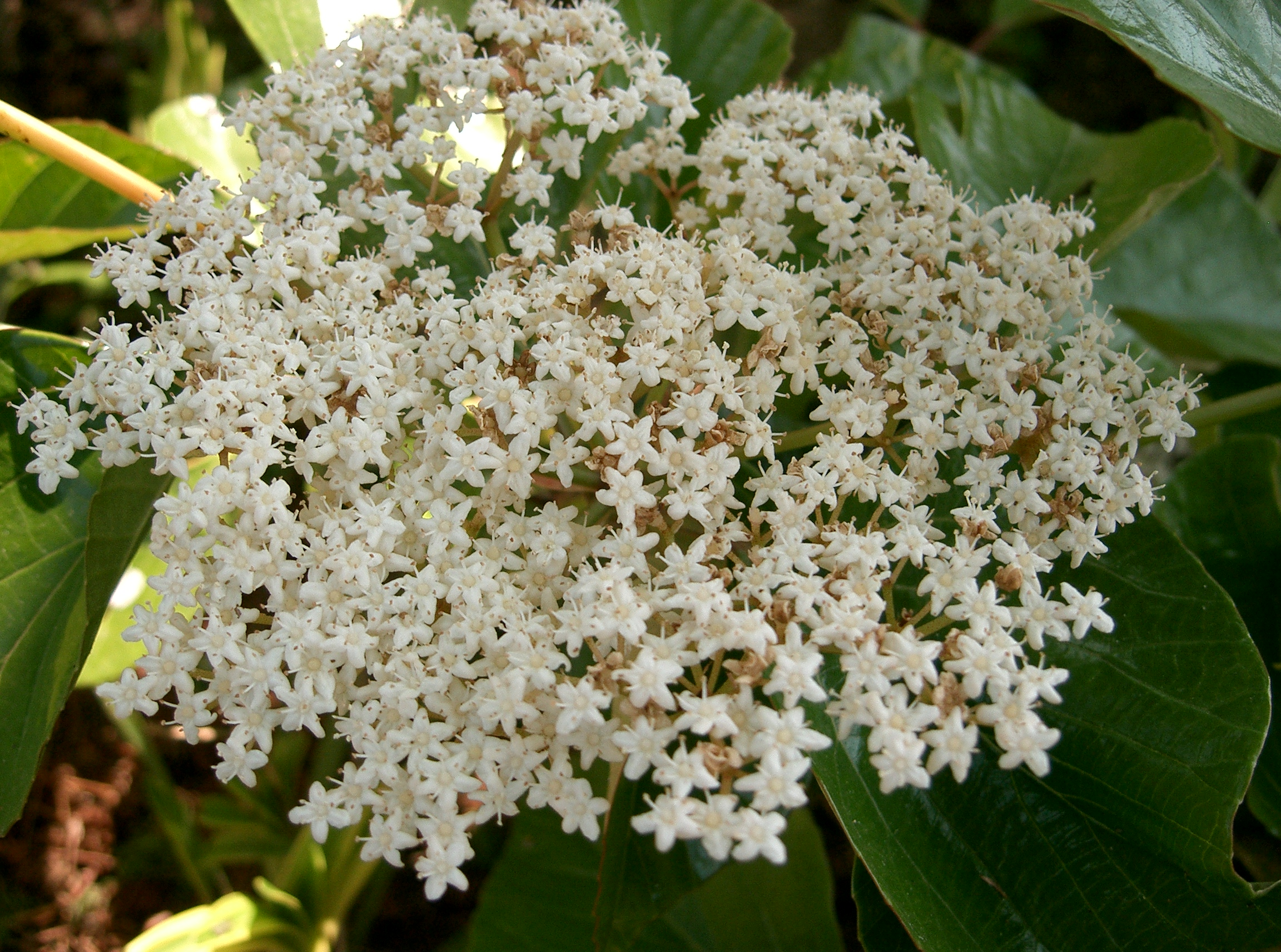 Scientific name Viburnum japonicum Cv.